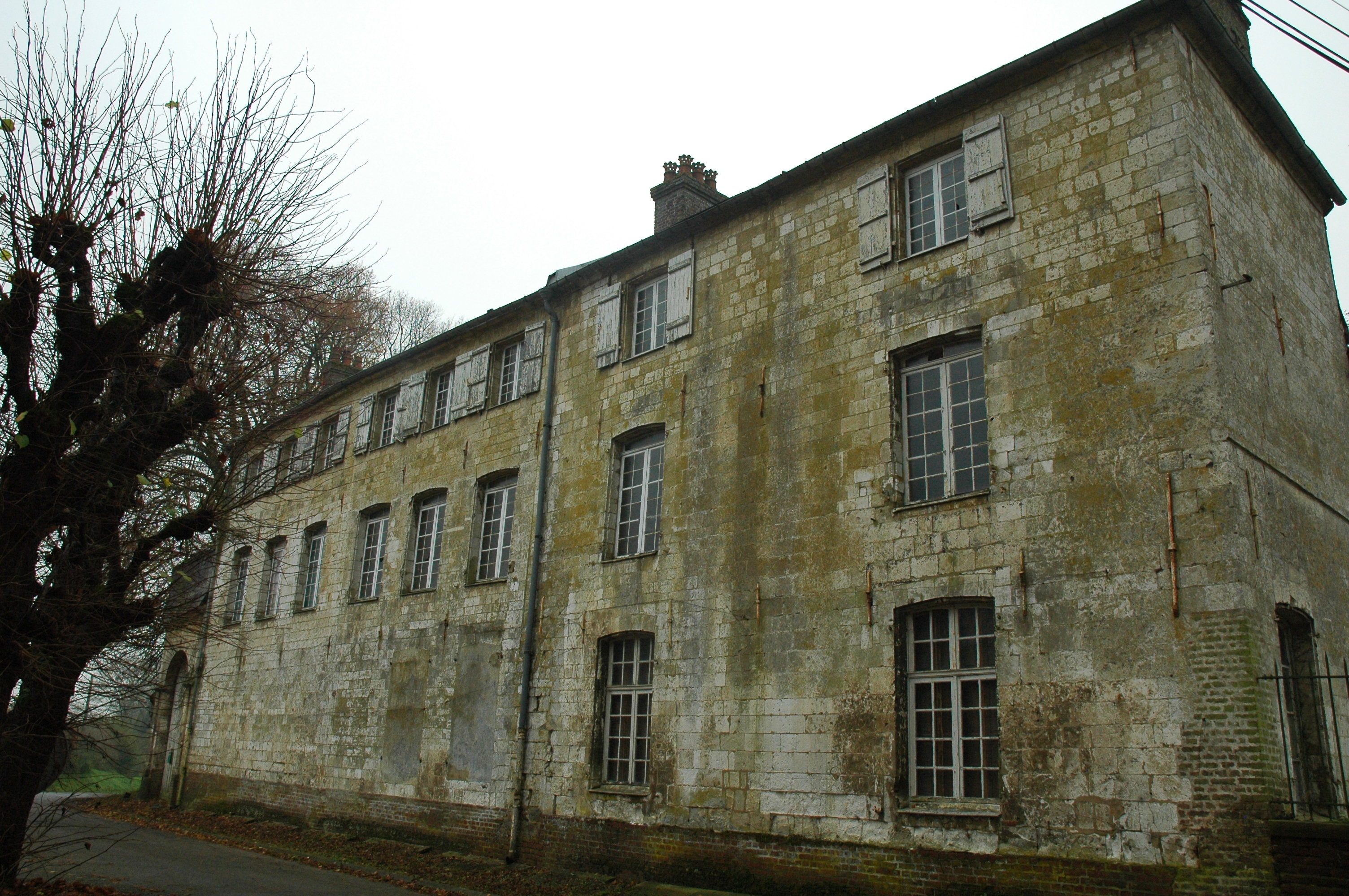 Arrière de chateau de Grenas, cette facade donne directement sur la place de village,construit en 1723.